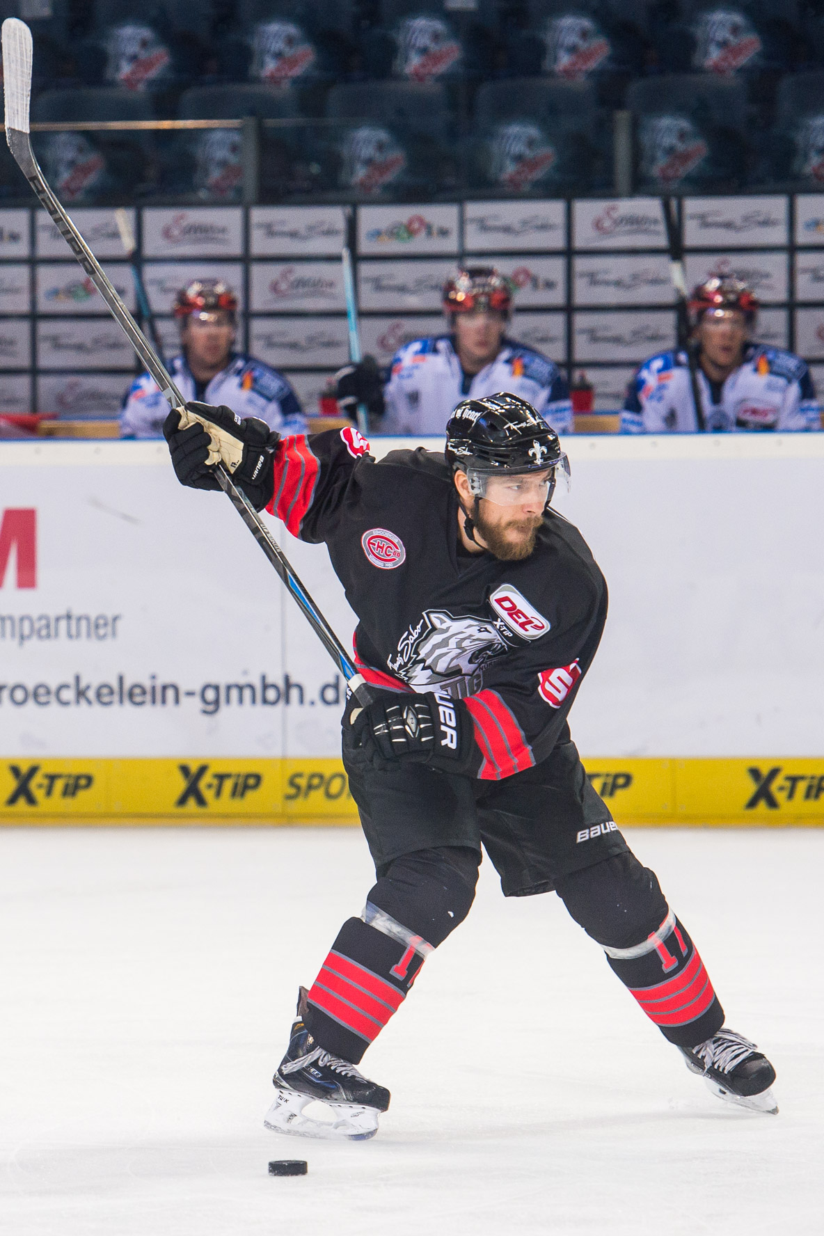 Arena Nürnberger Versicherungen,DEL,Eishockey,Iserlohn Roosters,Patrick Reimer,Thomas Sabo Ice Tigers Nürnberg